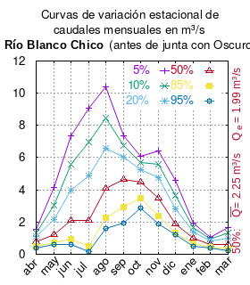 Curvas de variación estacional del río Blanco Chico en la est. de río Obscuro. # Dirección General de Aguas # Diagnóstico y clasificación de los cursos y cuerpos de agua según objetivos de calidad. Cuenca del río Aysén. # Santiago de Chile # Ministerio de Obras Públicas (Chile) # 2004 # url: # urlarchivo: # Tabla 4.5: Estación Blanco Chico antes de junta con Oscuro , pág. 53 mes 5% 10% 20% 50% 85% 95% abr 1.56 1.34 1.12 0.78 0.51 0.39 may 4.15 3.04 2.14 1.20 0.74 0.63 jun 7.37 5.58 3.99 2.10 0.95 0.60 jul 9.08 6.97 4.87 2.10 0.49 0.16 ago 10.39 8.46 6.59 4.09 2.27 1.61 sep 7.36 6.77 6.04 4.65 2.95 1.94 oct 6.06 5.71 5.28 4.47 3.46 2.88 nov 6.39 5.60 4.77 3.51 2.39 1.89 dic 4.57 3.63 2.81 1.88 1.35 1.19 ene 1.93 1.66 1.39 0.98 0.64 0.50 feb 1.04 0.93 0.81 0.62 0.45 0.37 mar 1.64 1.32 1.02 0.62 0.34 0.24 This plot was created with Gnuplot.